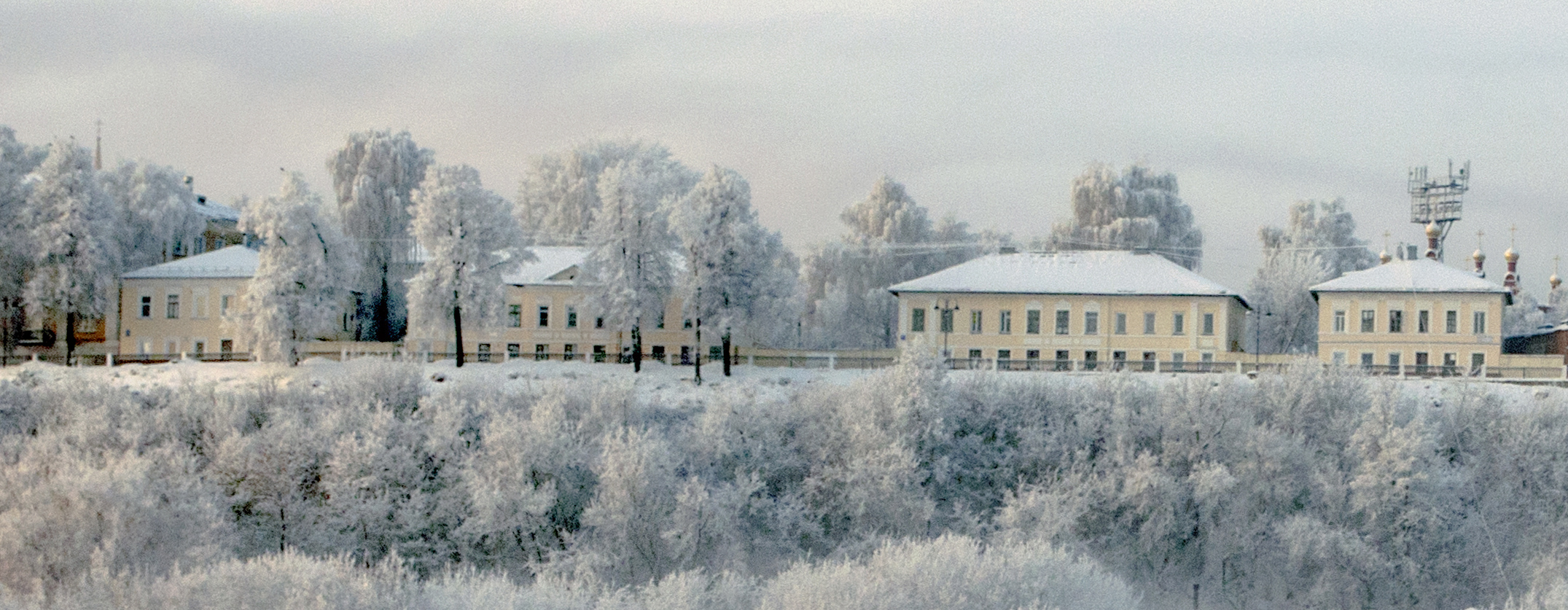 Комплекс домов служителей кафедрального собора: набережная Грина, 15, 17, 19, Киров, Кировская область